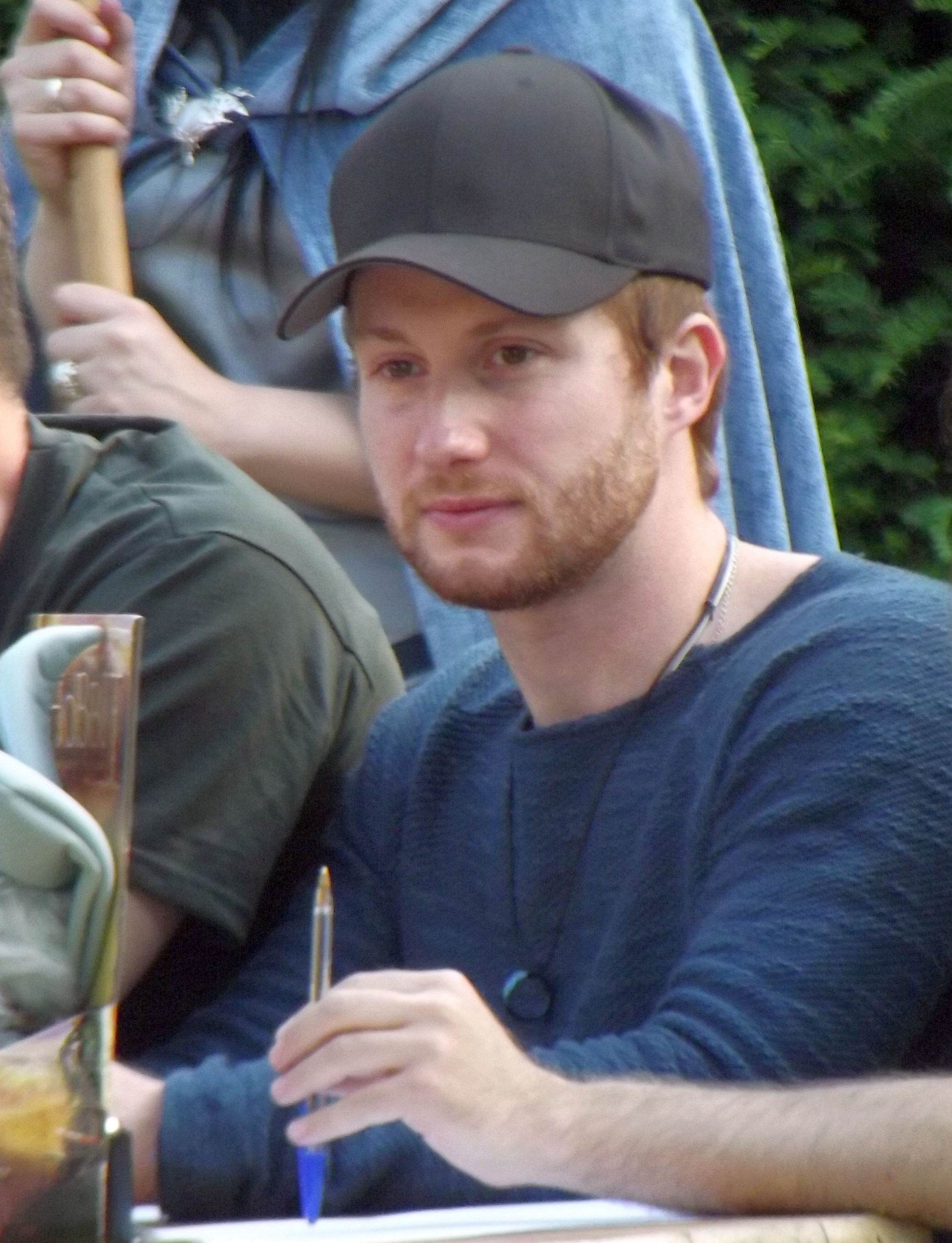 Davide Perino nella giuria della sfilata di cosplayer al castello di Osasco per sentieri tolkieniani (giugno 2014)